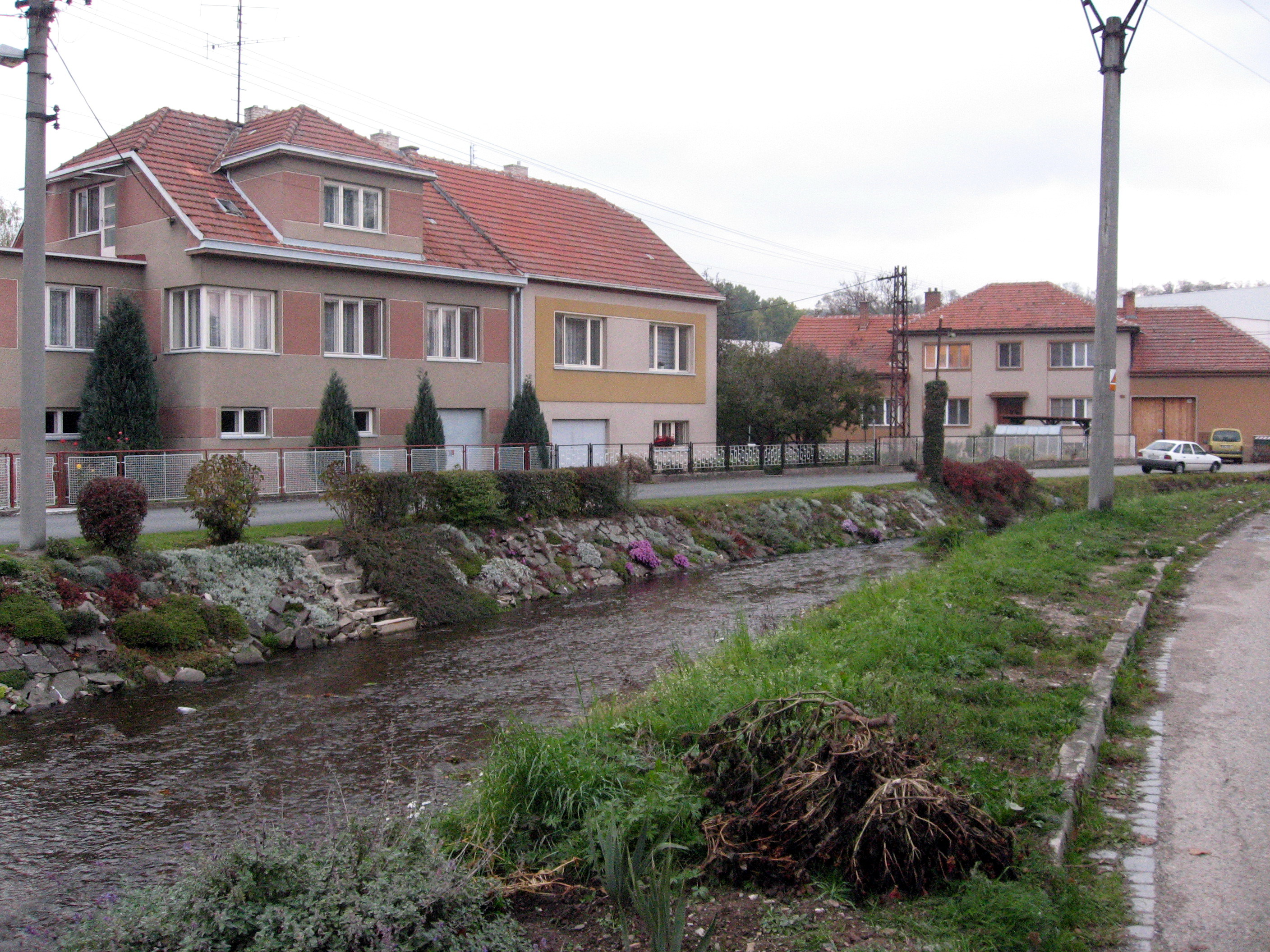 Veverská Bítýška, Bílý potok